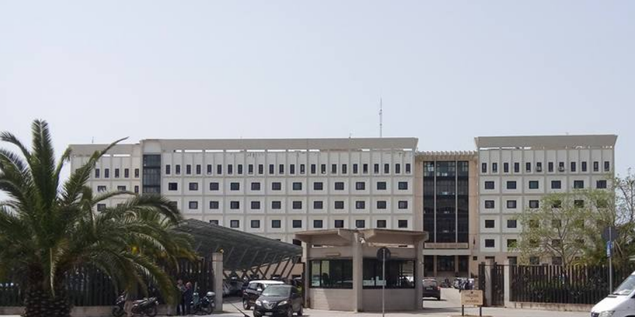 Palazzo di giustizia - Santa Panagia, Siracusa